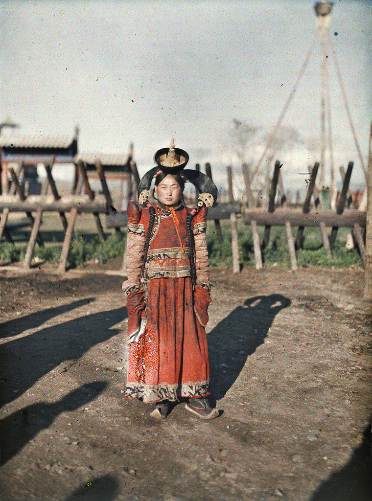 1913年，库伦的已婚妇女。